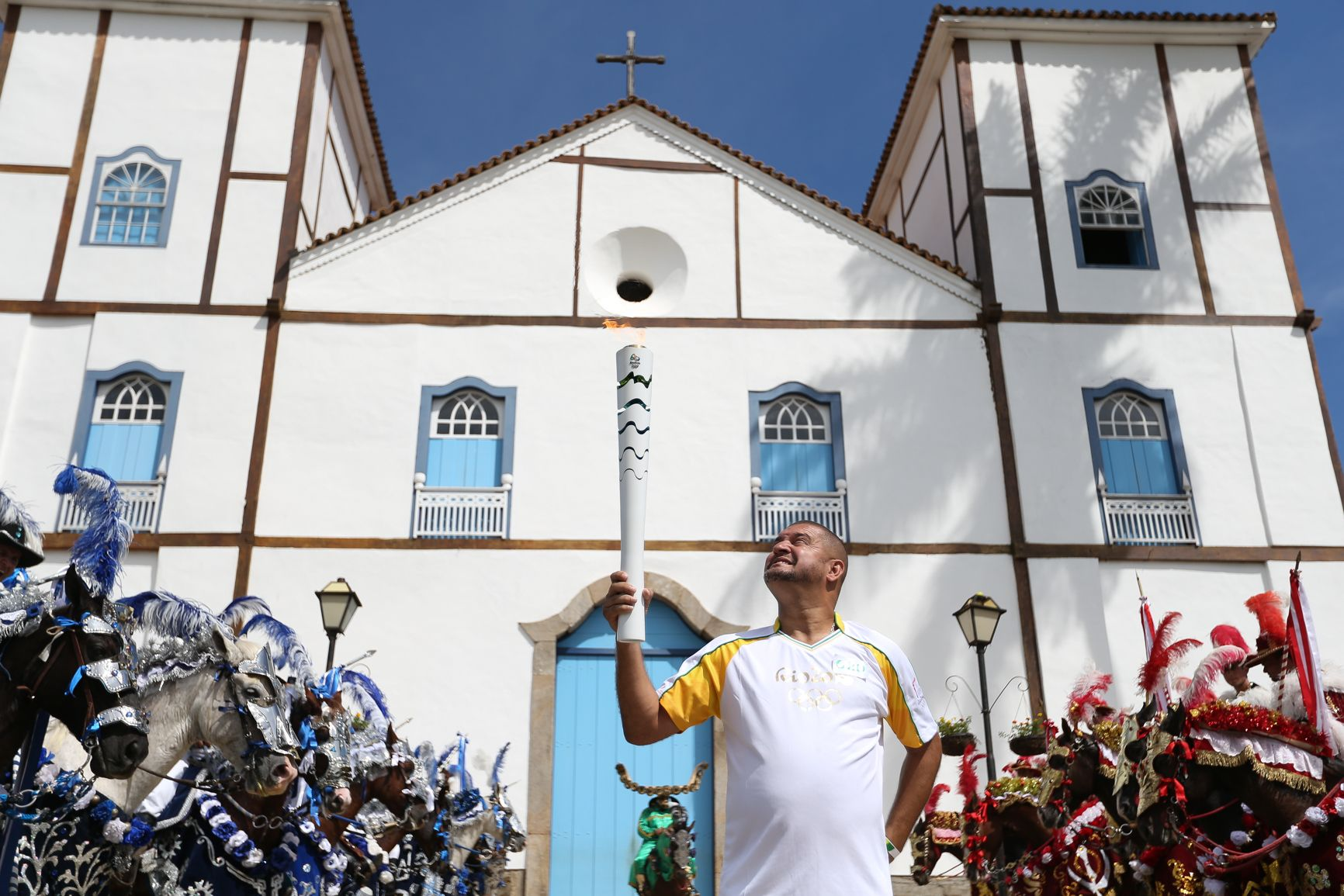 Pirenópolis (GO) - Conduzida por atletas e personagens marcantes da localidade, a Tocha Olímpica percorre pontos turísticos da cidade goiana.